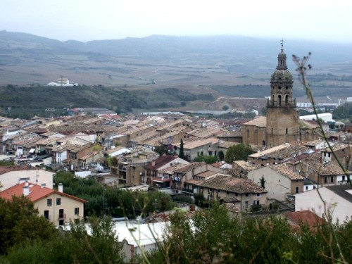 Vista de Gares